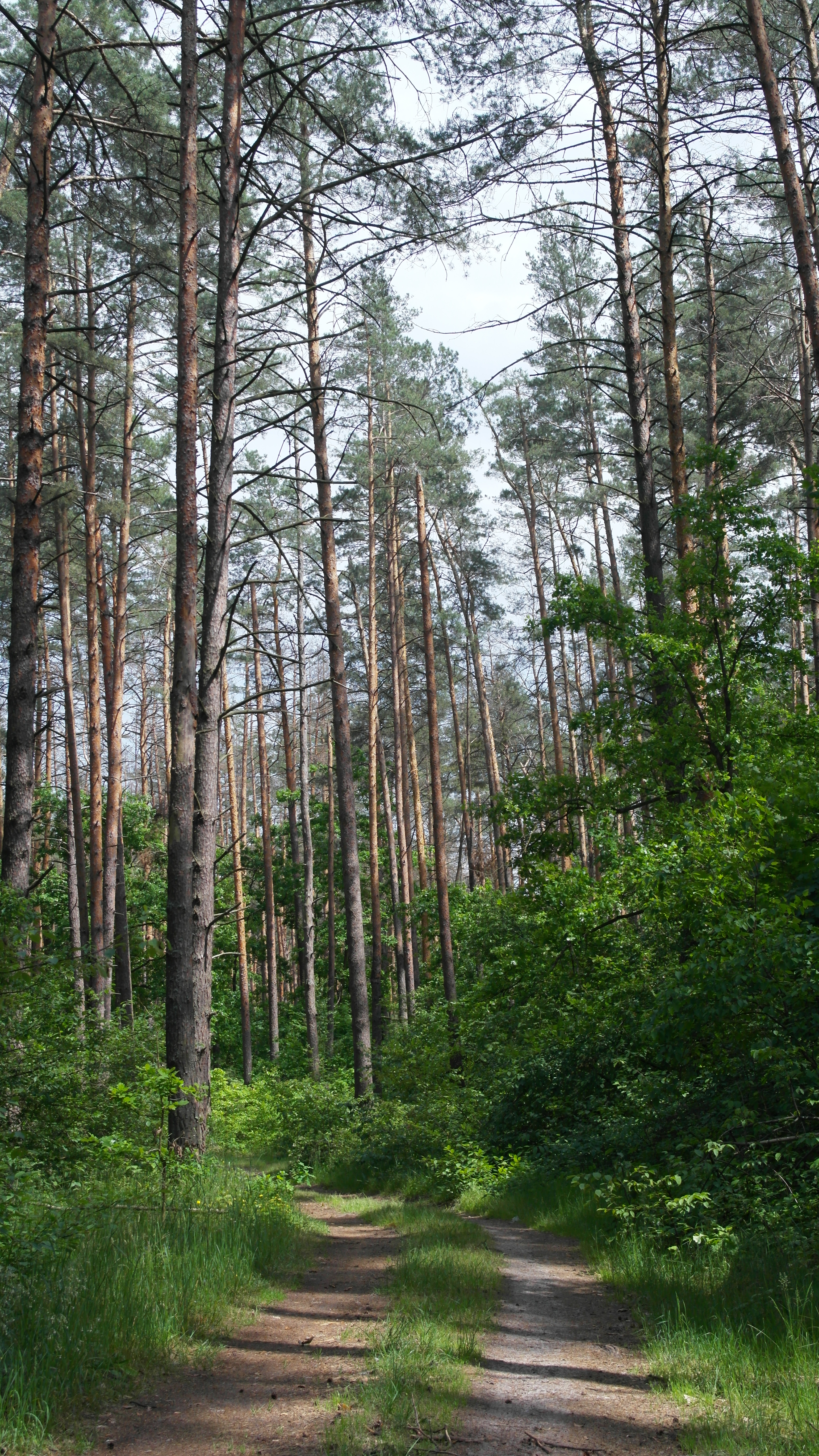 «Жуків хутір», Києво-Святошинський район, Бузівська та Михайло-Рубежівська сільські ради